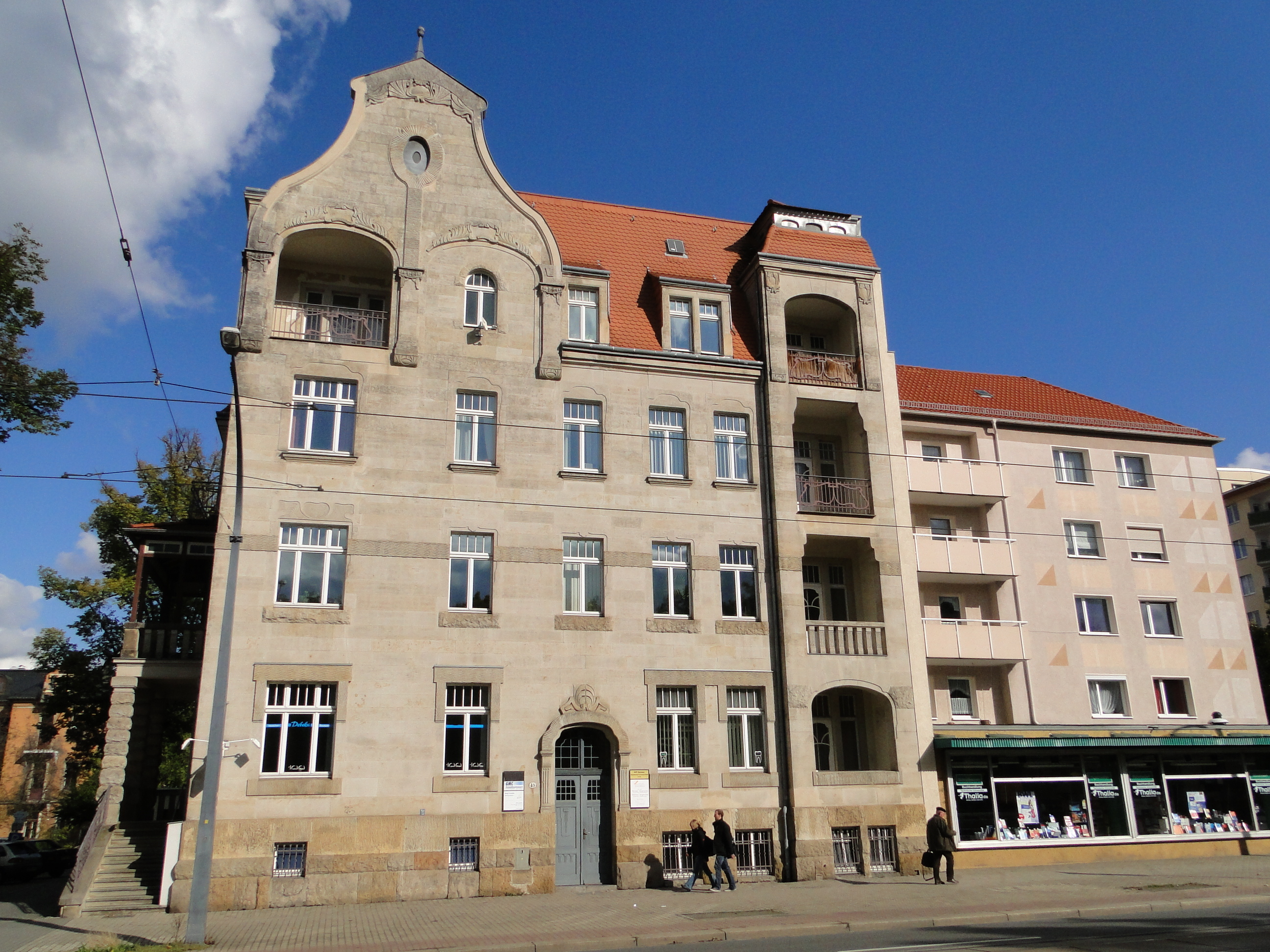 Mietshaus Nürnberger Straße 49, Dresden, mit Elementen des Jugendstils